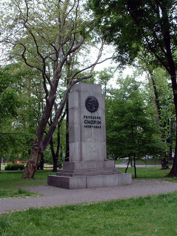 Chopin-Denkmal in Gliwice, Medaillon mit Profil-Relief.